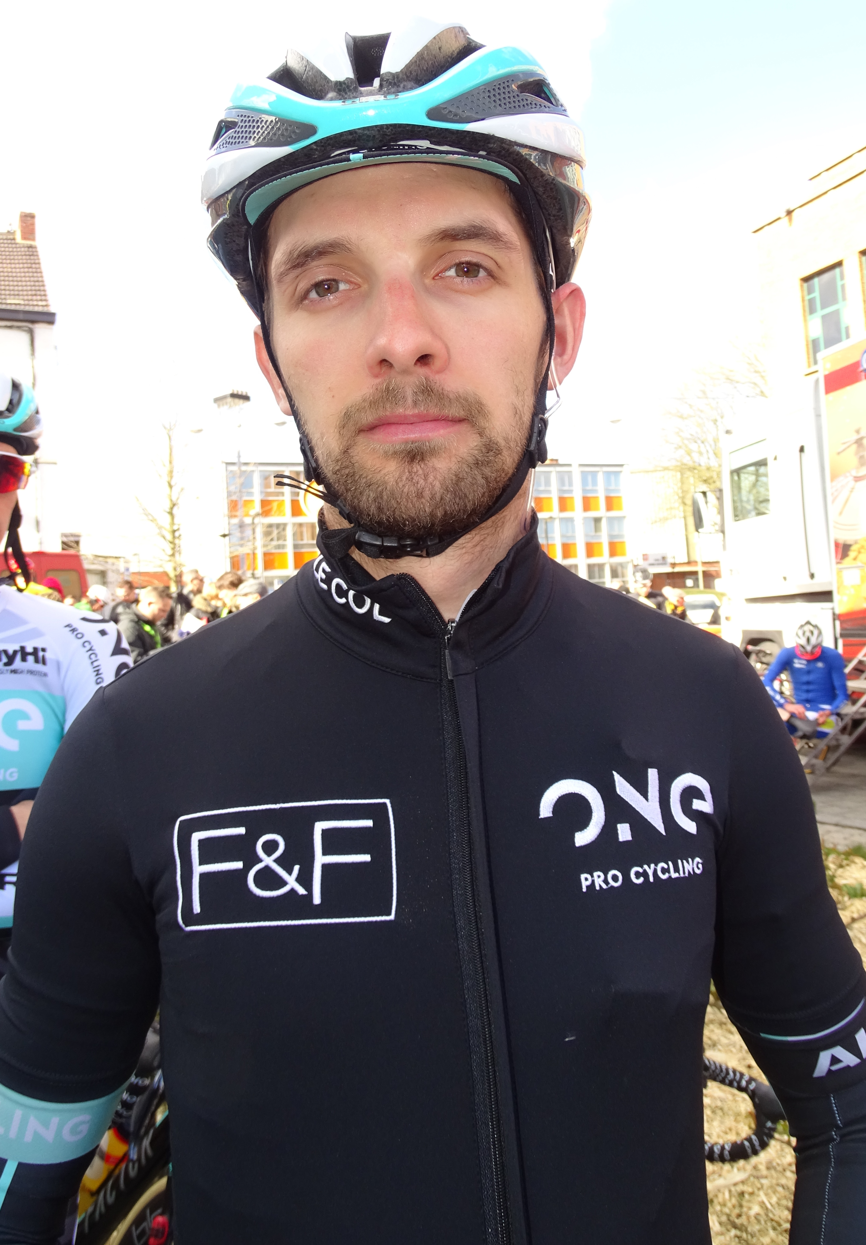 Reportage réalisé le mercredi 2 mars à l'occasion du départ du Samyn des Dames 2016 et du Samyn 2016 à Quaregnon, Belgique.